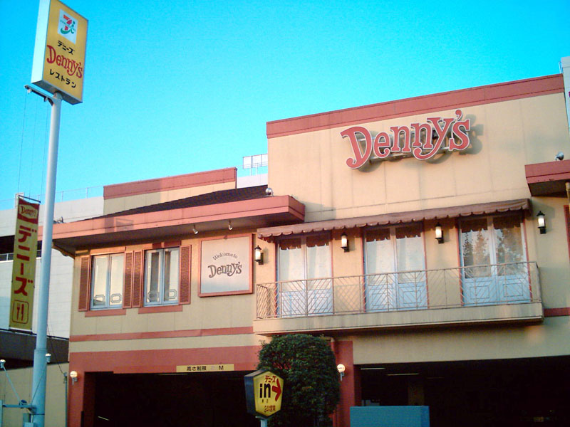 デニーズ蕨店。埼玉県蕨市北町5丁目4-3。中仙道沿い。